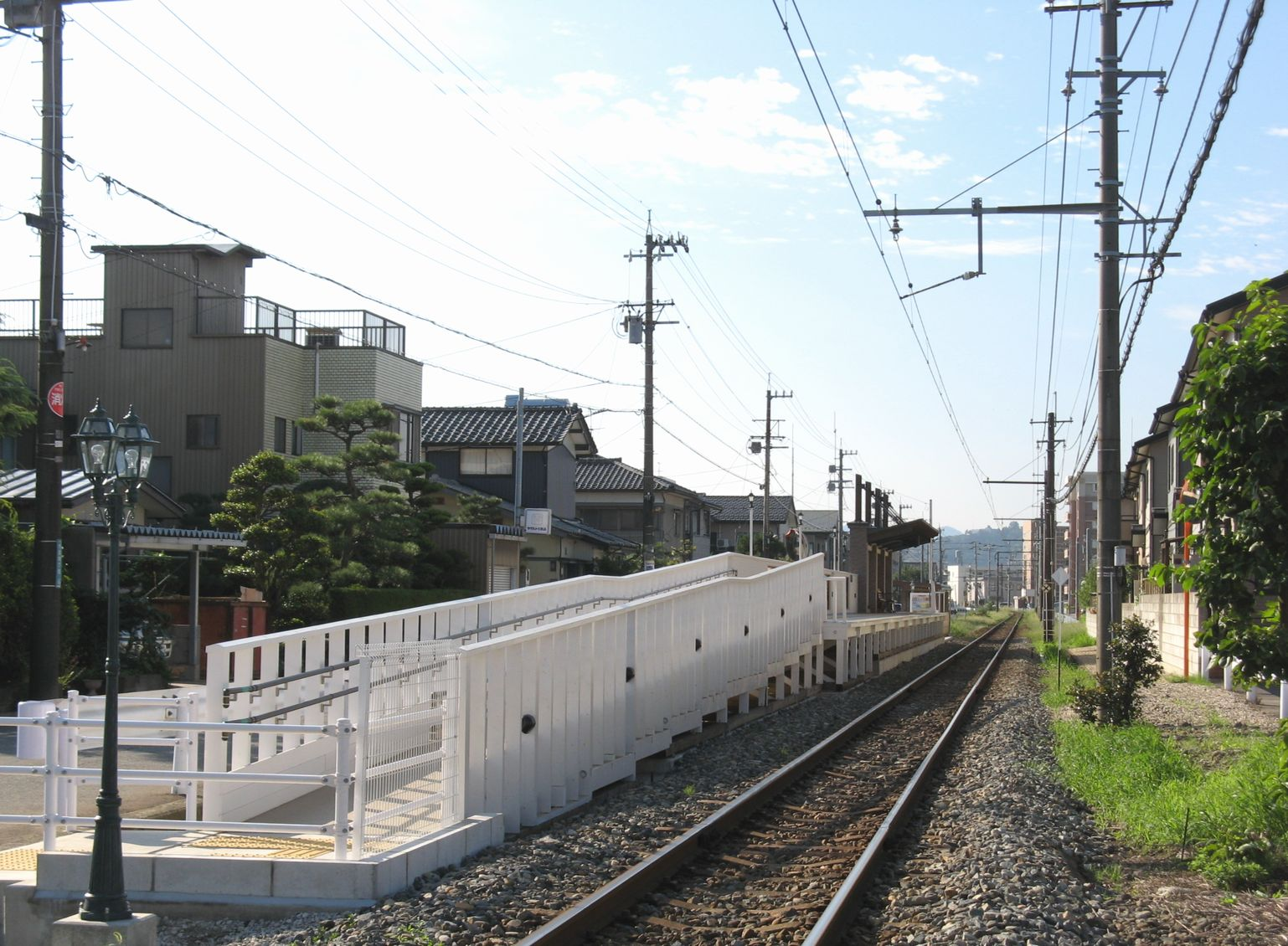 日華化学前駅 踏切から南望